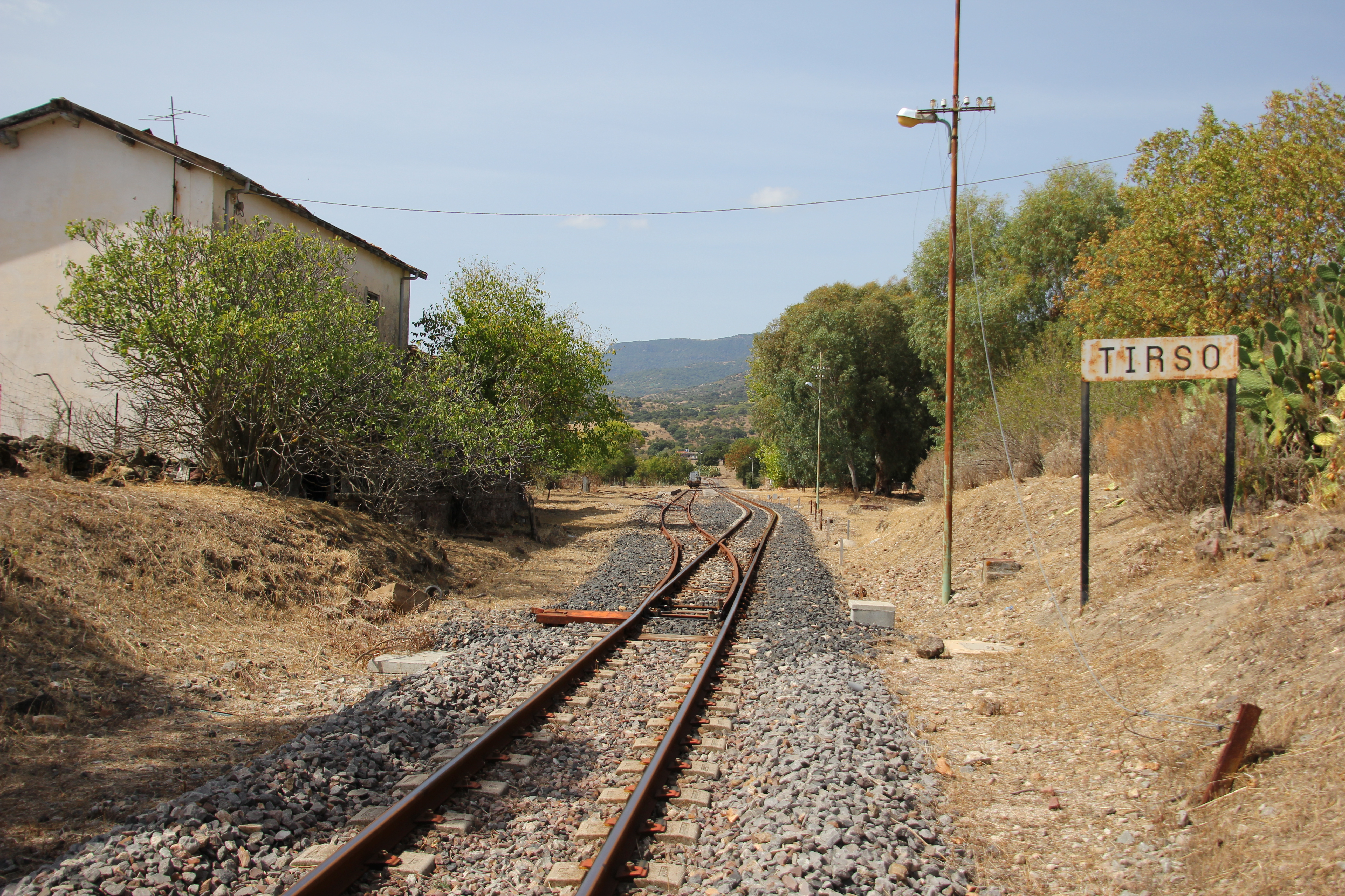 Illorai - Stazione Tirso